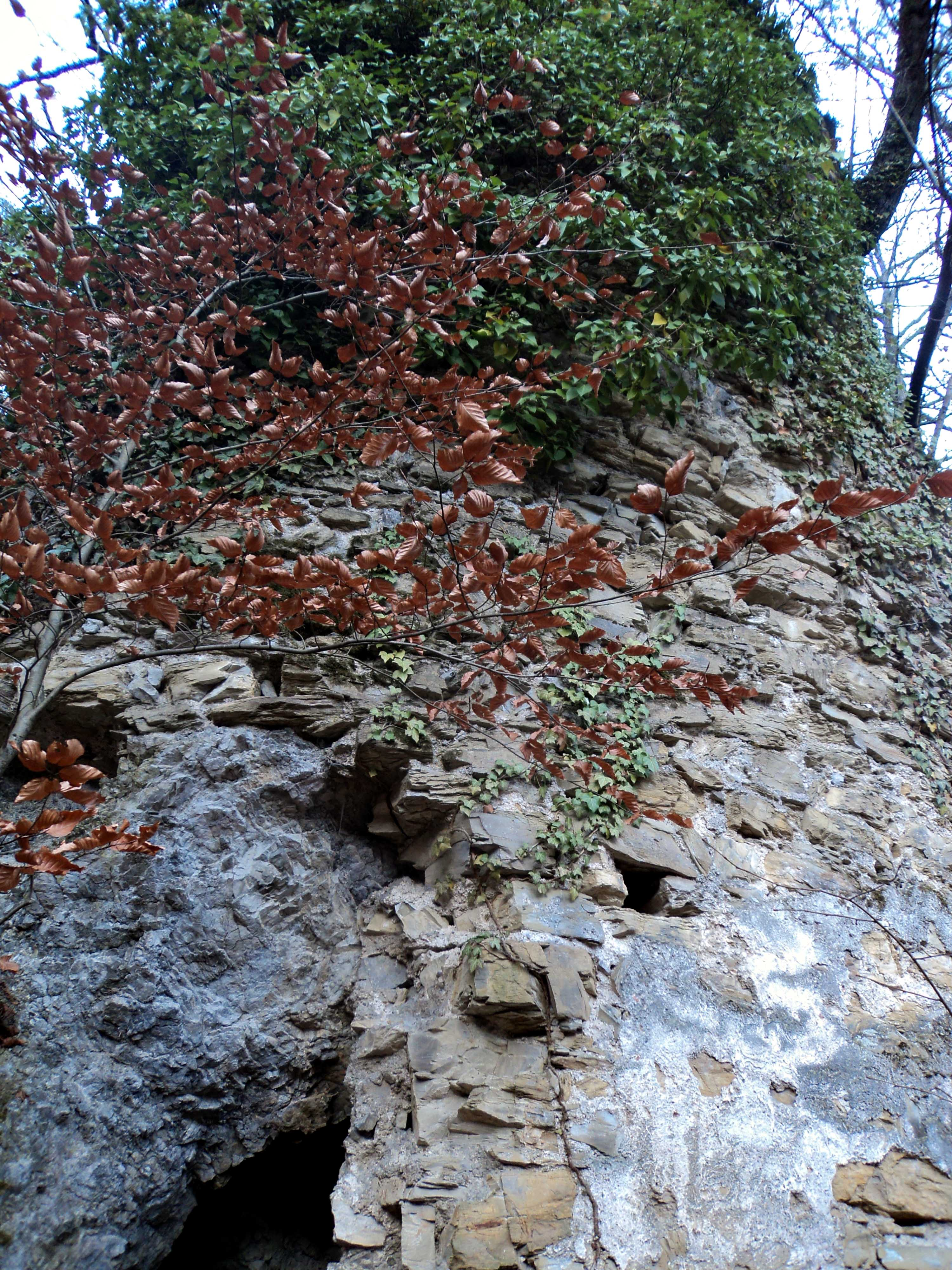 Grad Boštanj 04, 2012